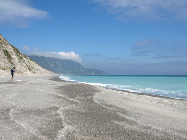 新島東側海岸